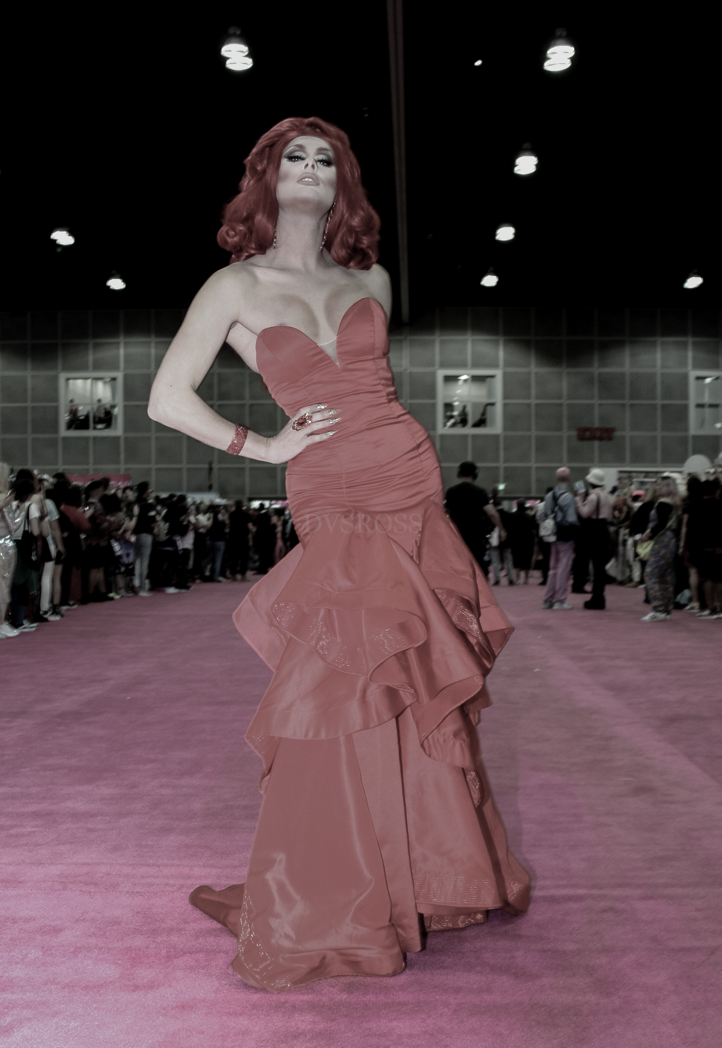 Rupaul DragCon 2019 - Los Angeles